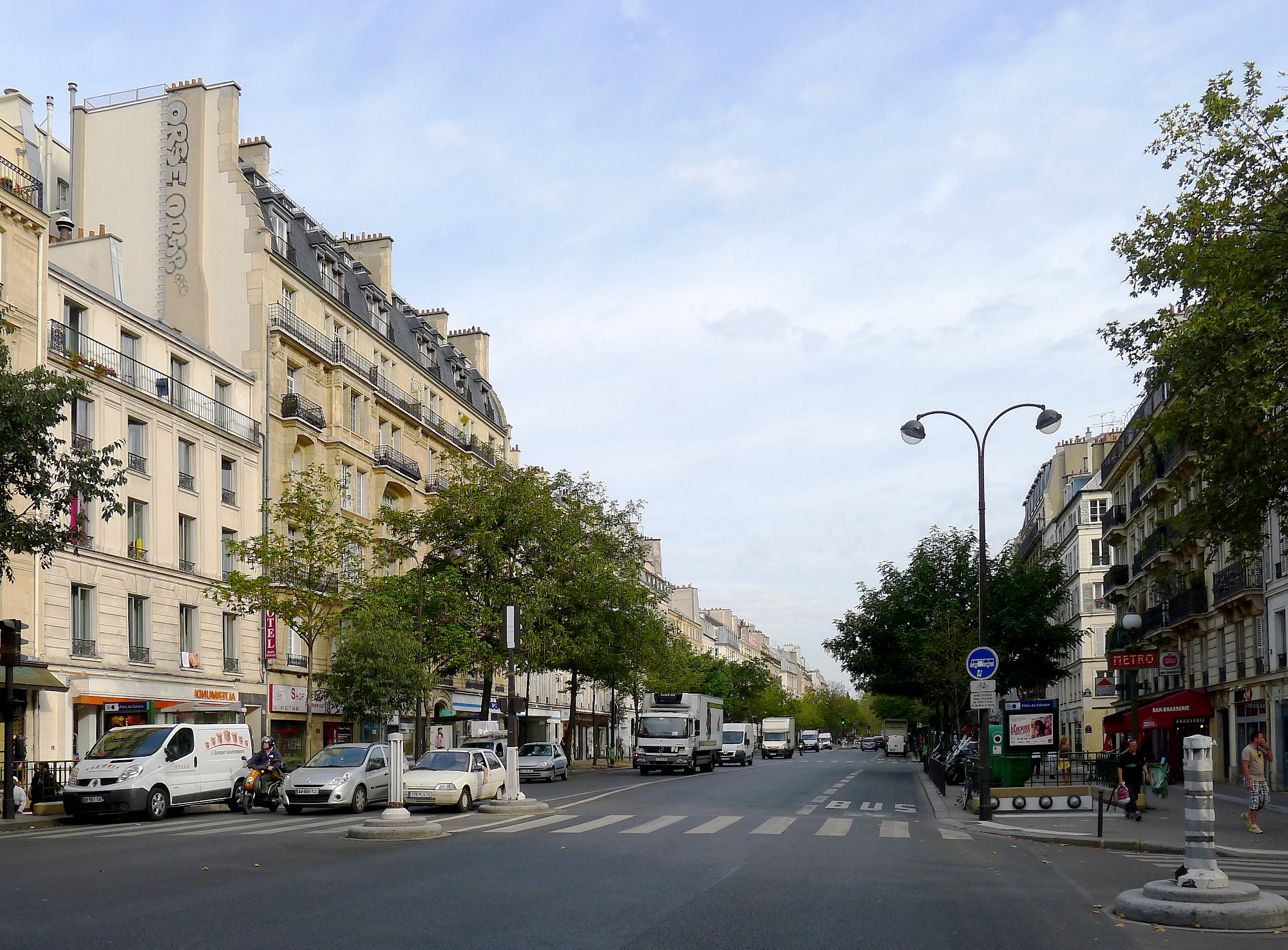 Boulevard du Temple - Paris III-XI